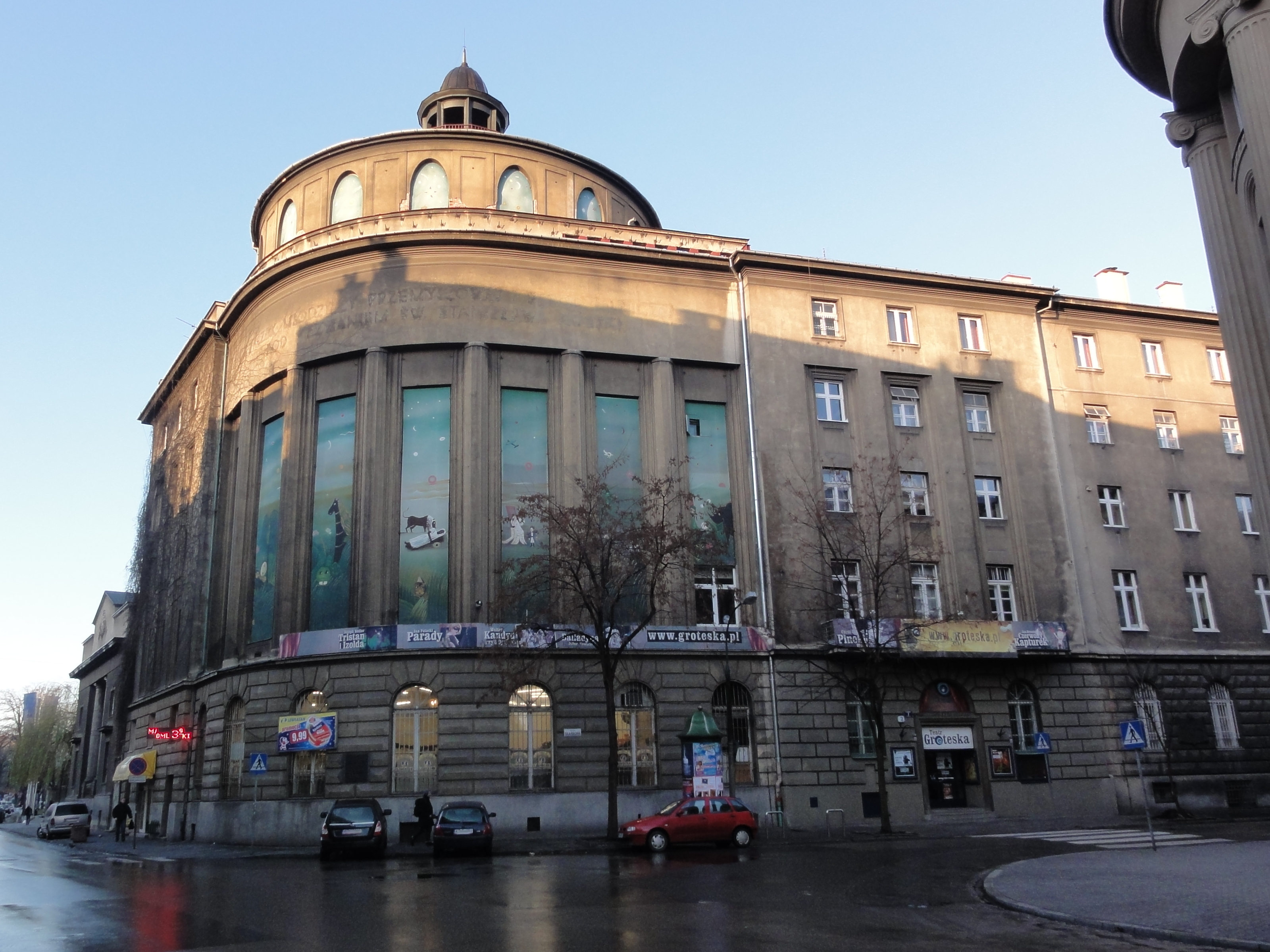 Kraków, Tetr Groteska w Krakowie